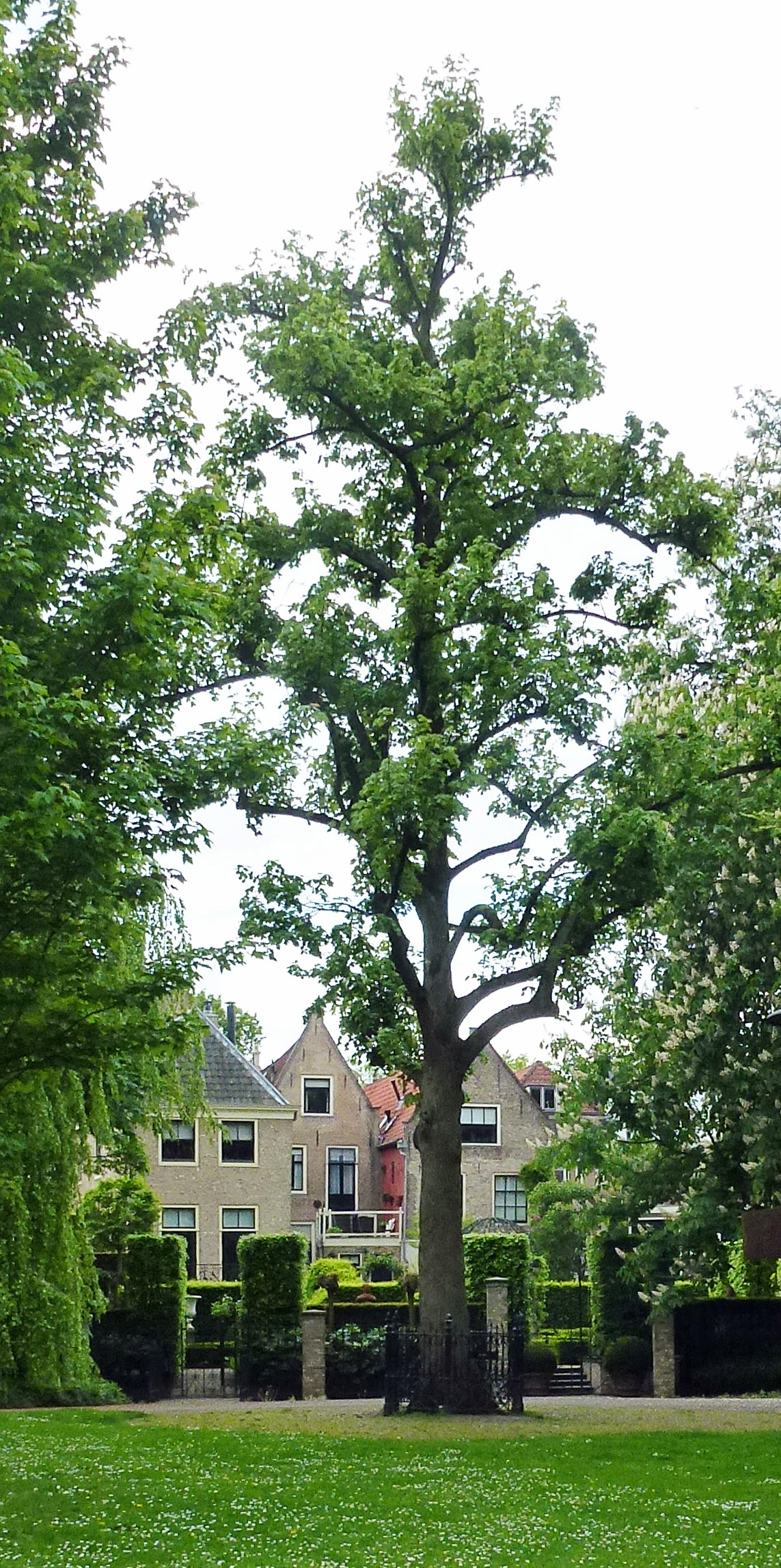 Wilhelminaboom t.g.v. de troonsbestijging van Koningin Wilhelmina. De boom met boombescherming is een Rijksmonument en staat in het Houtmansplantsoen